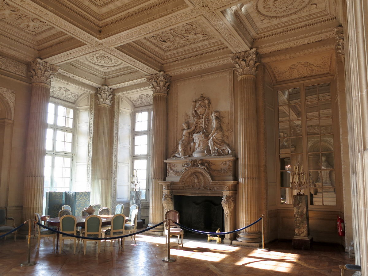 Château de Maisons-Laffitte, salle à manger du comte d'Artois (futur Charles X), mobilier réalisé par Georges Jacob